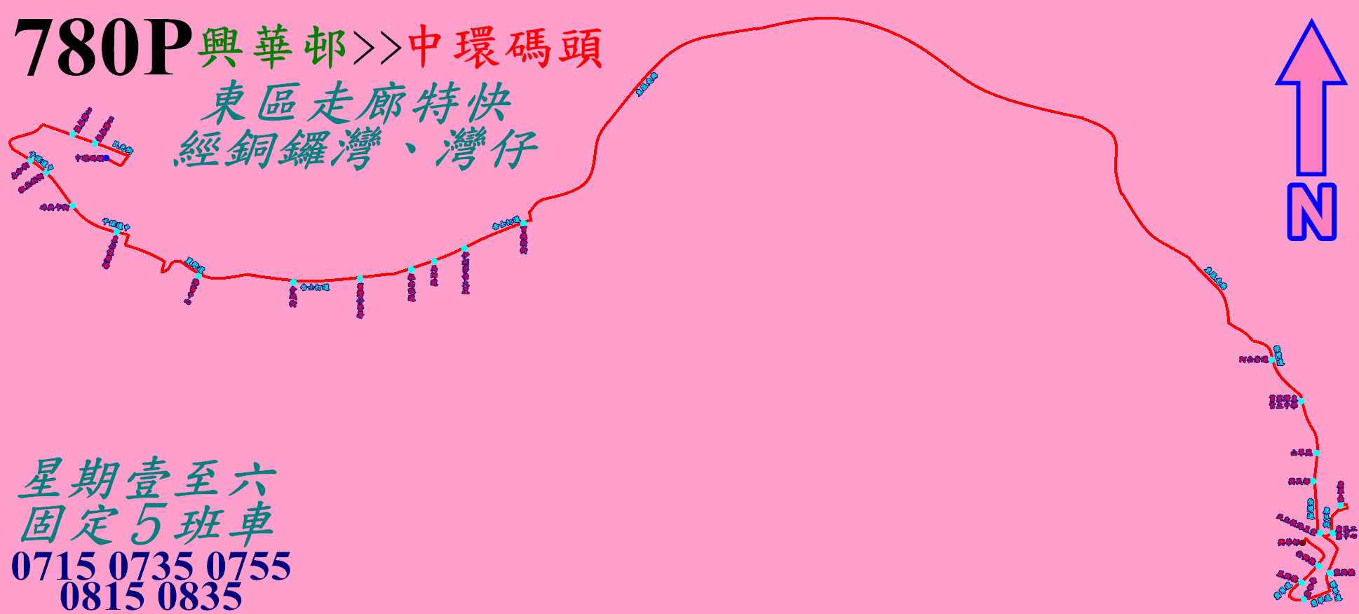 中文（香港）: 城巴780P線的走線圖